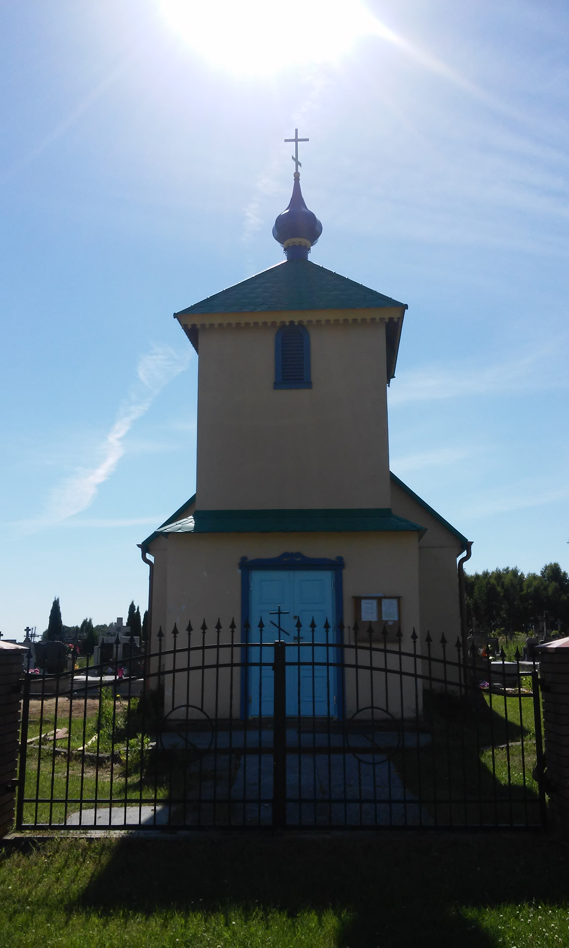 Elewacja cerkwi w Kodeńcu